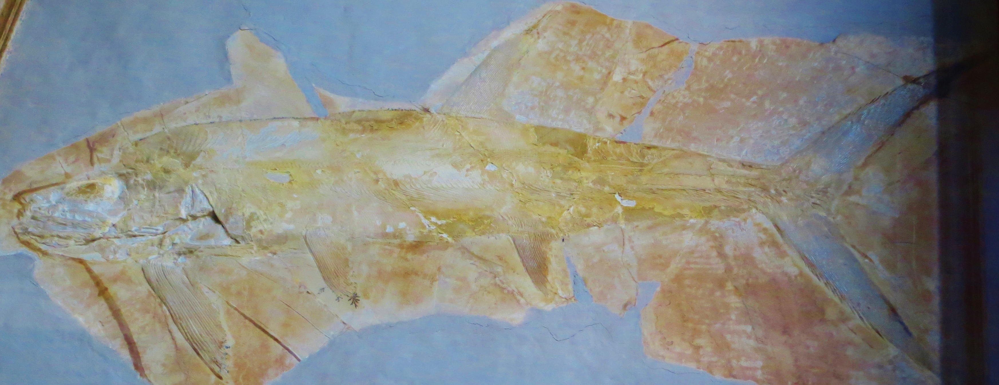 Fossil of Orthocormus, an extinct fish - Took the picture at Teylers Museum, Haarlem